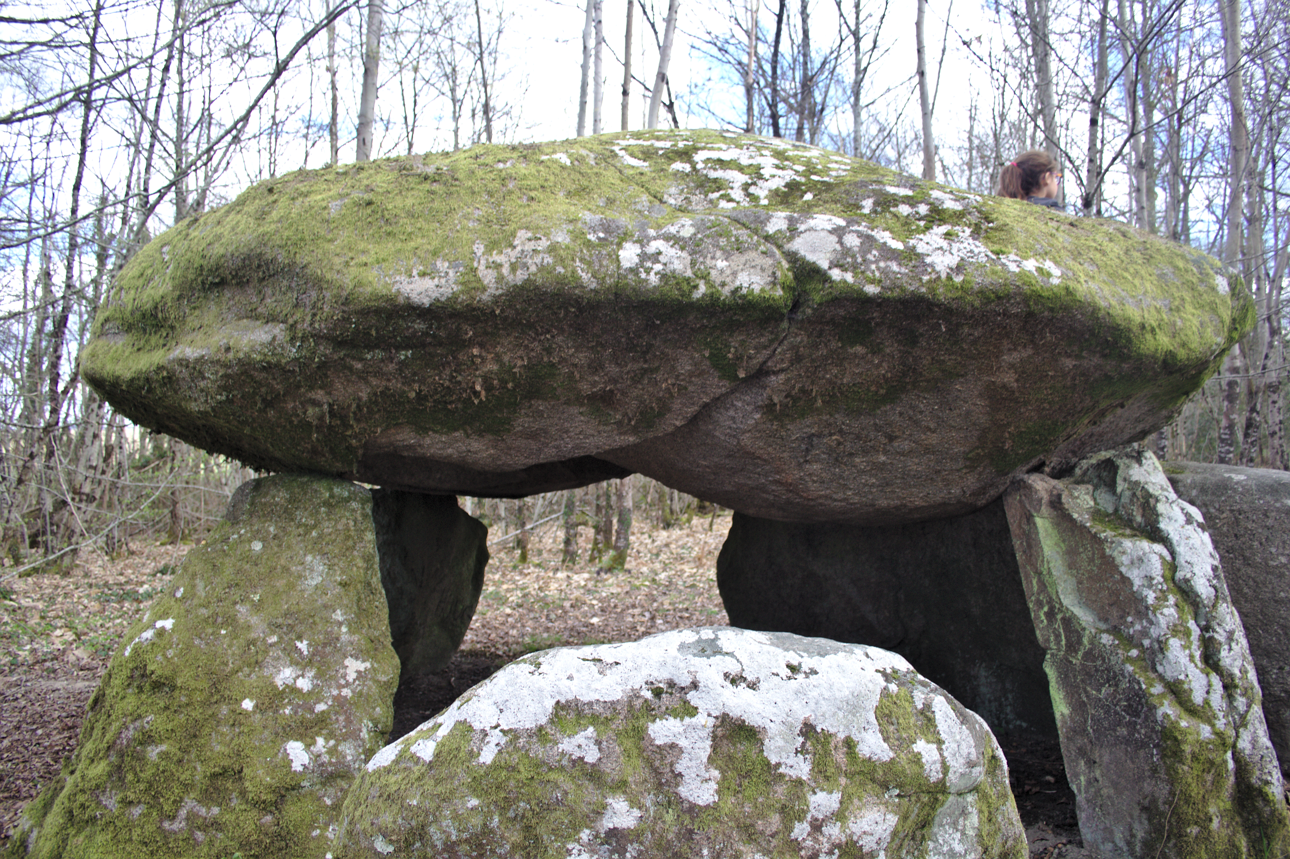 Dolmen de Bouéry, site classé monument historique depuis 1940, agé de plus de 4000 ans, situé dans le nord de la Haute-Vienne.